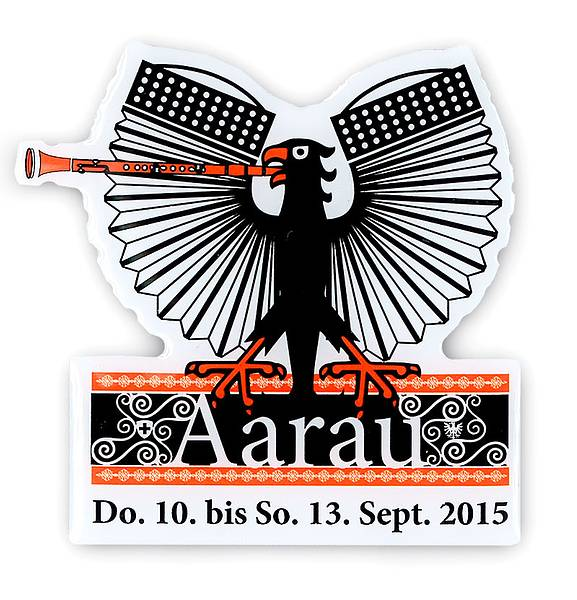 Logo Eidg. Volksmusikfest 2015, Aarau, Schweiz